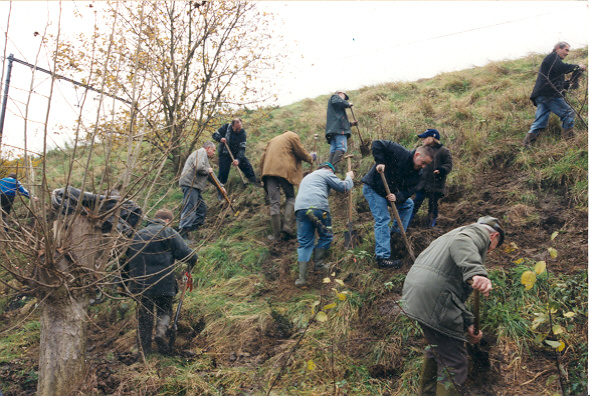 Op de dag van de natuur hielpen de wijkbewoners om de spoorwegberm te beplanten.